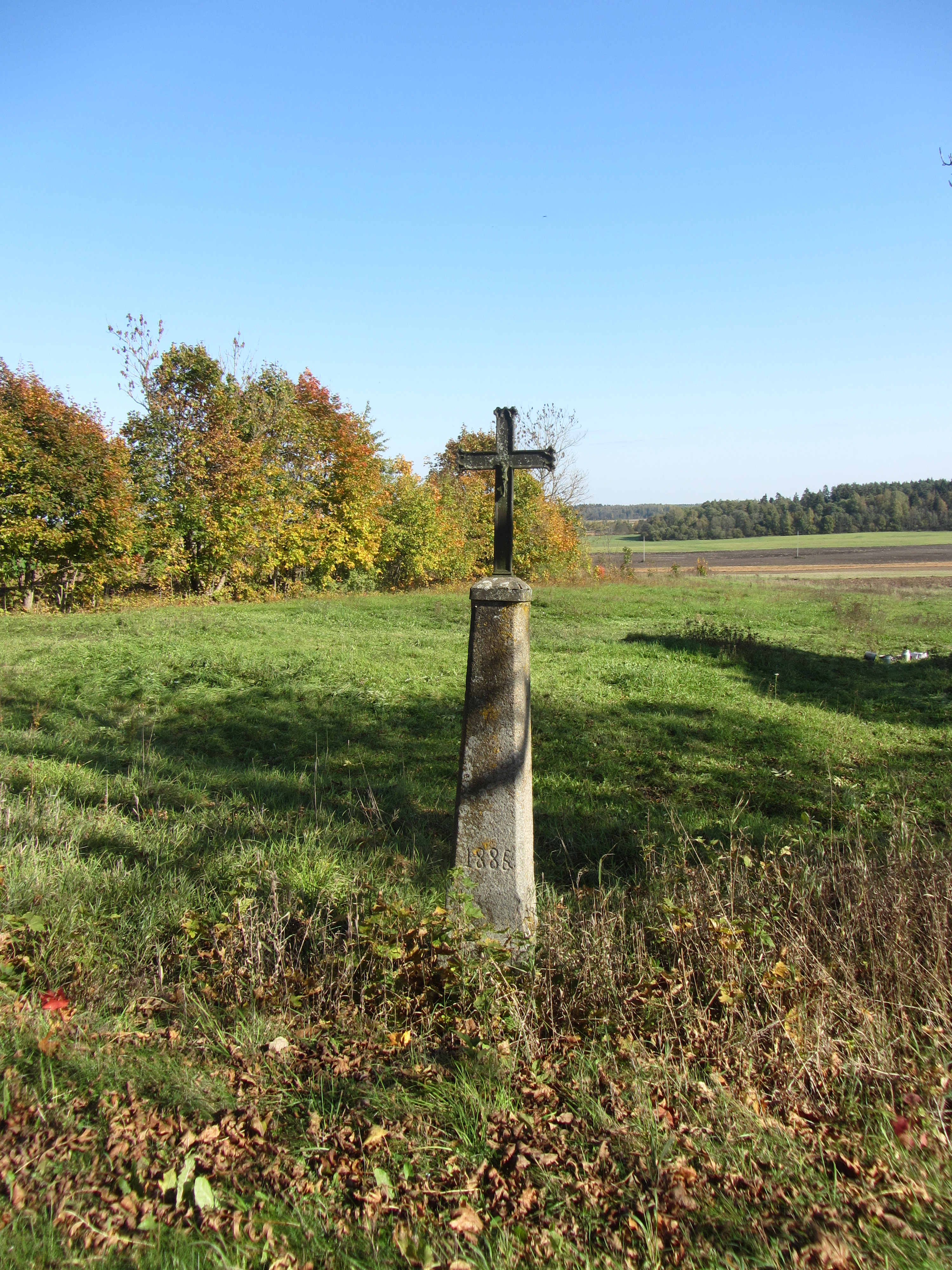 Vilkoliai 42422, Lithuania